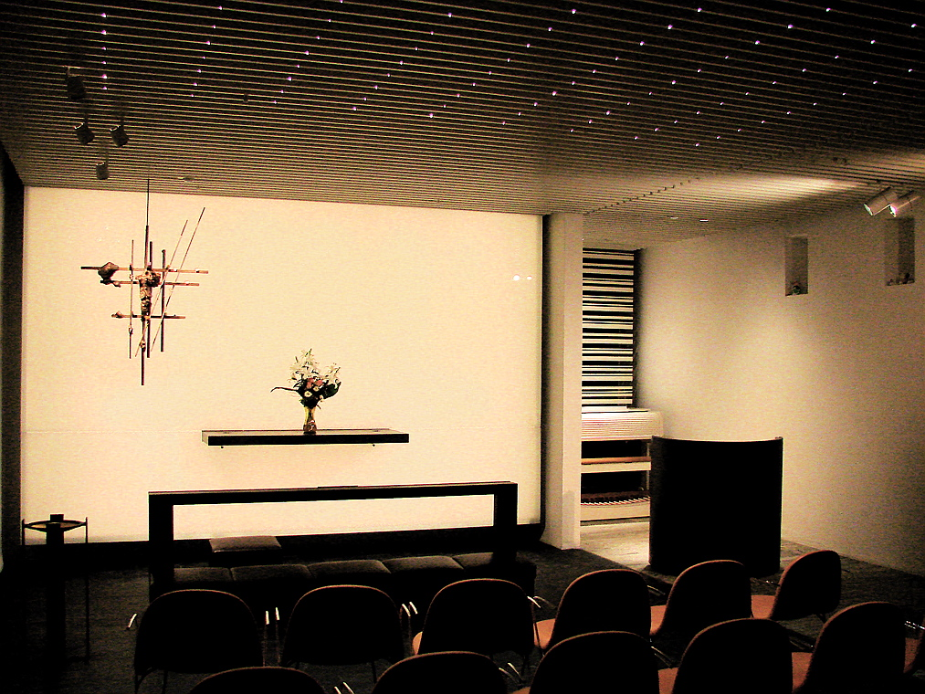 Rigshospitalets kirke efter fornyelsen i 2008, Rigshospitalet, København